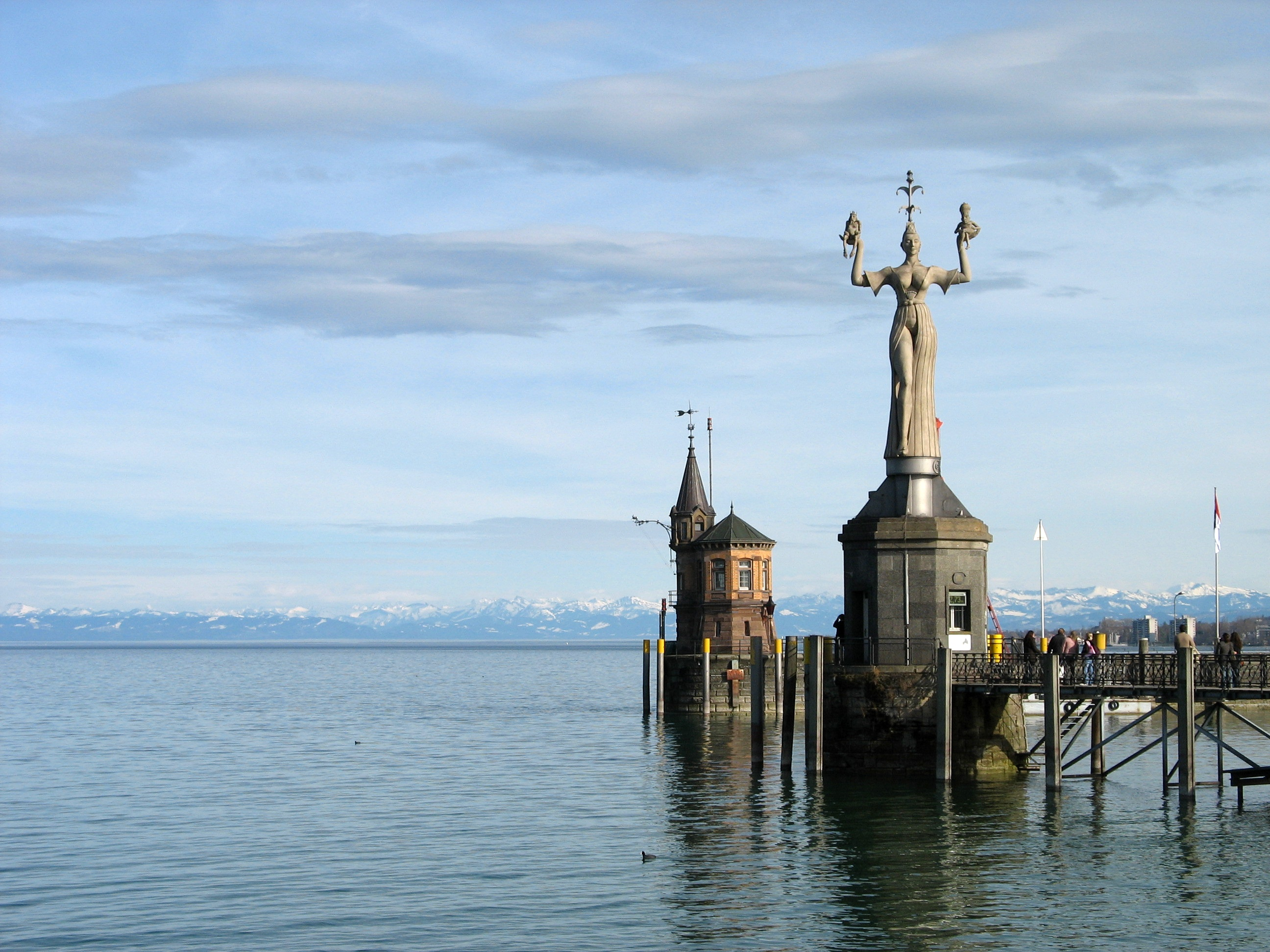 Konstanz: Imperia vor Alpenkulisse